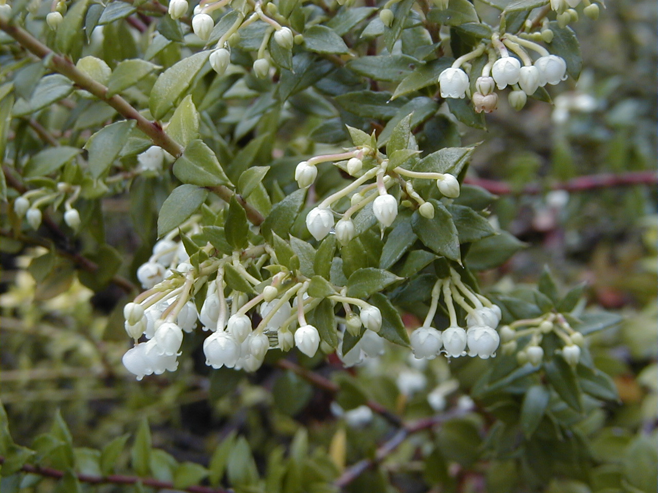 Gaultheria mucronata (= Pernettya mucronata). Real Jardín Botánico, Madrid.